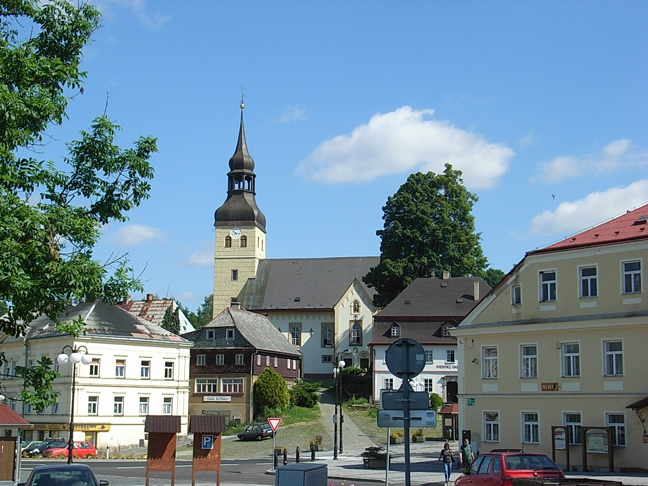 Chřibská náměstí